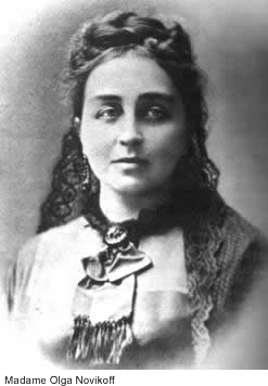 Olga Novikoff, noble russe, amie de W. T. Stead